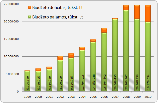 Budżet Litwy 1999 – 2009. Na zielono zaznaczono dochód w litach, na pomarańczowo - deficyt budżetowy